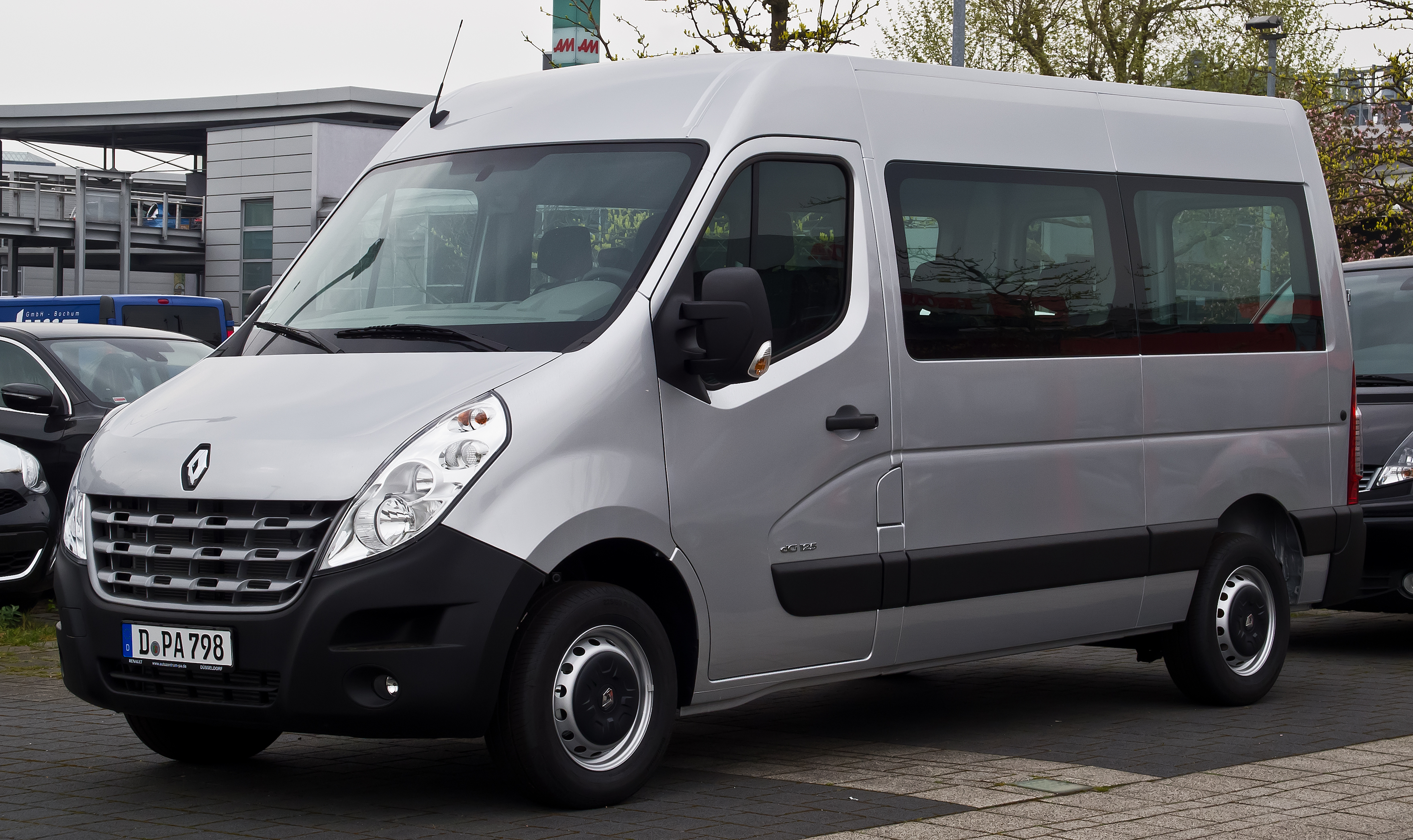 Renault Master Combi dCi 125 (III)